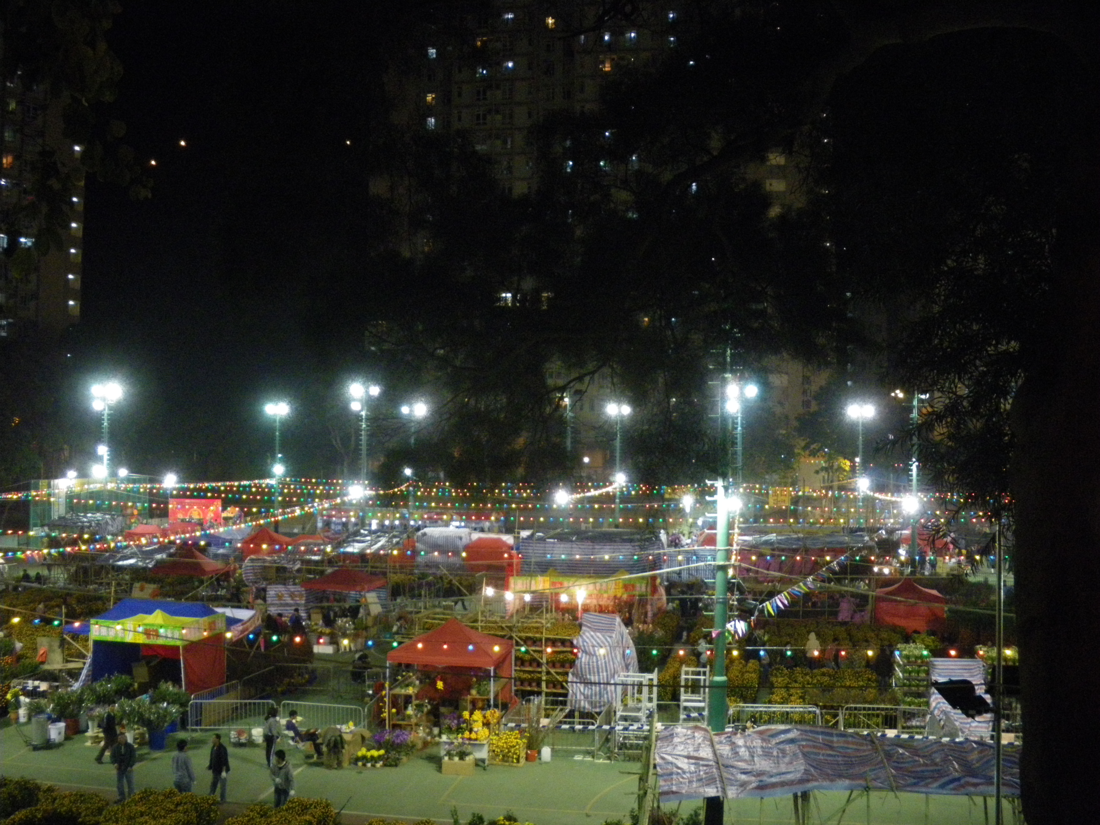 2011 Jan, Kwun Tong (觀塘)